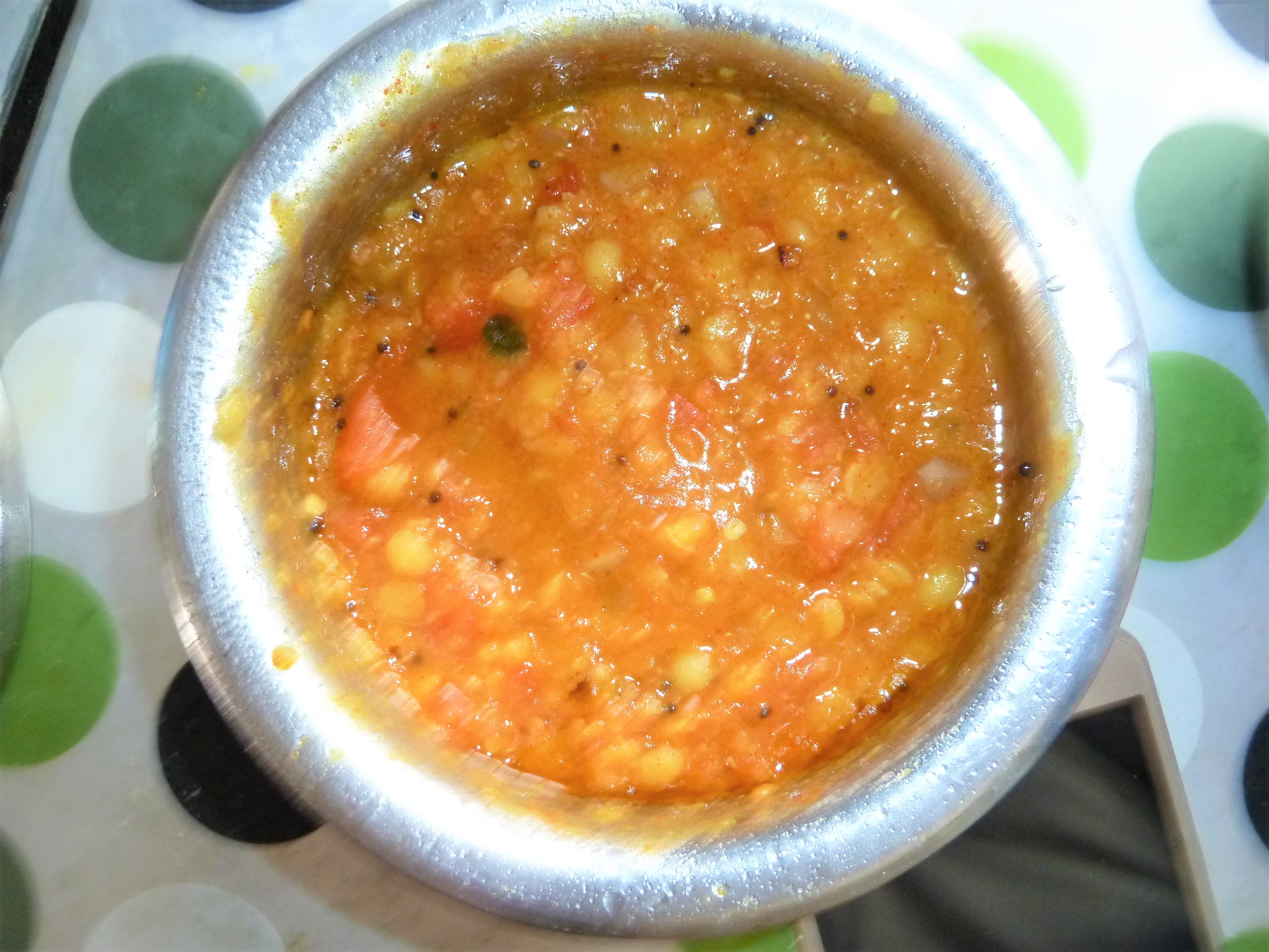 టమాటా పప్పు